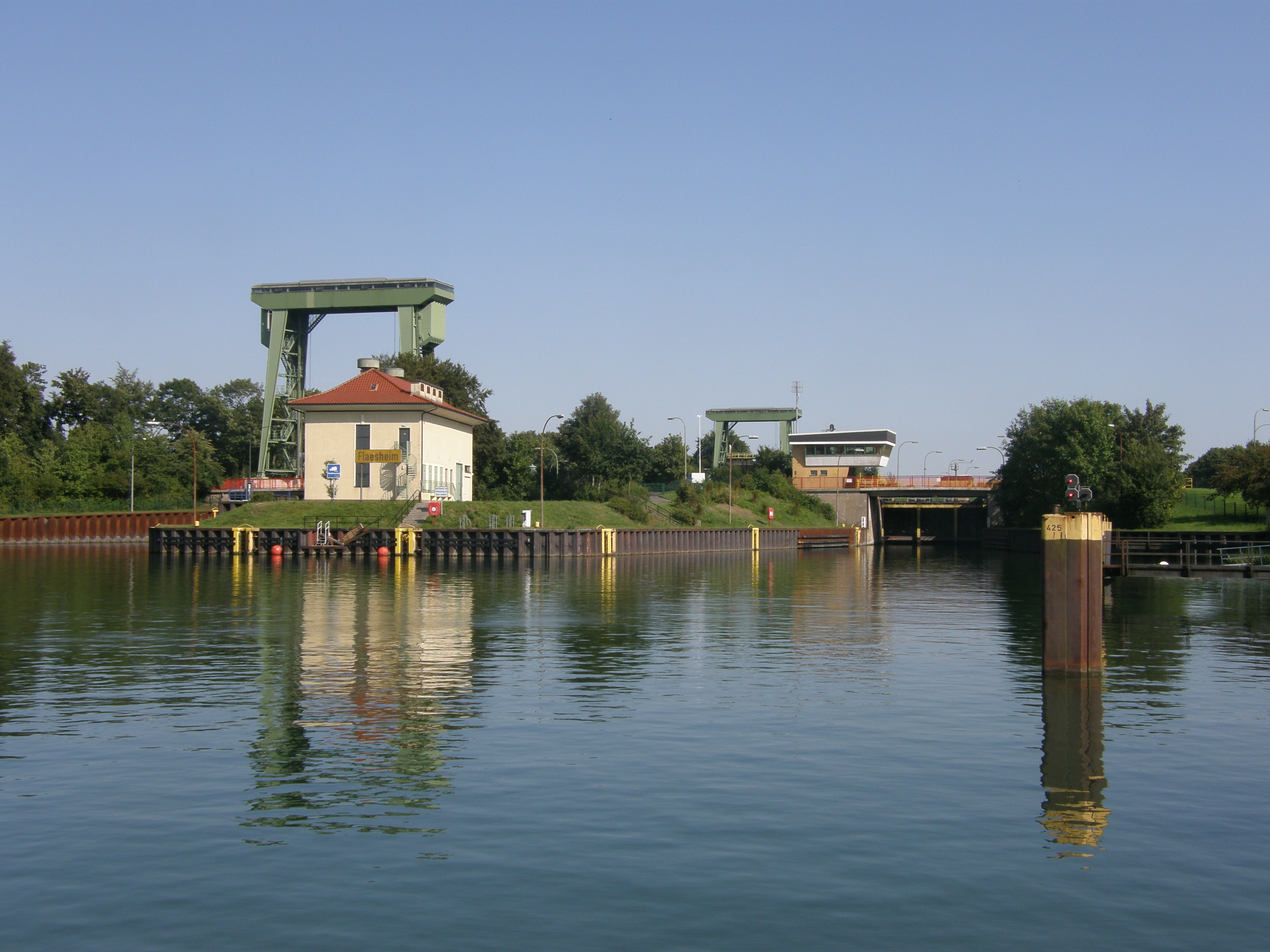 Schleuse Flaesheim am Wesel-Datteln-Kanal Unterwasser, rechts die Einfahrt zum kleinen Becken, links zum großen Becken, in der Mitte die Pumpstation